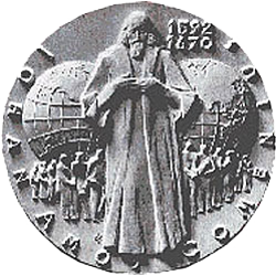 Медаль Яна Амоса Коменского (Чешская республика)